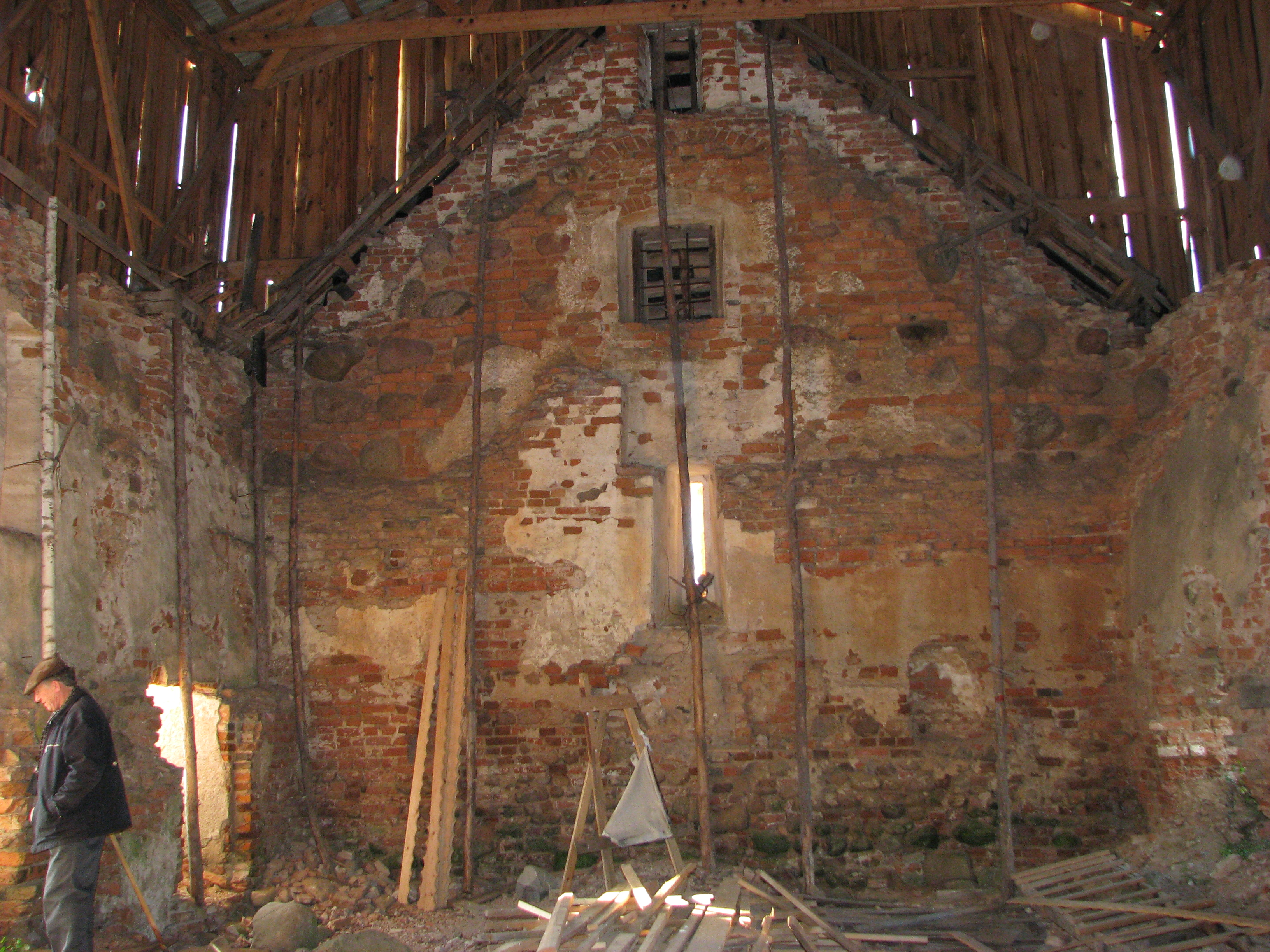 XVI a. Baltadvario bastioninė pilis